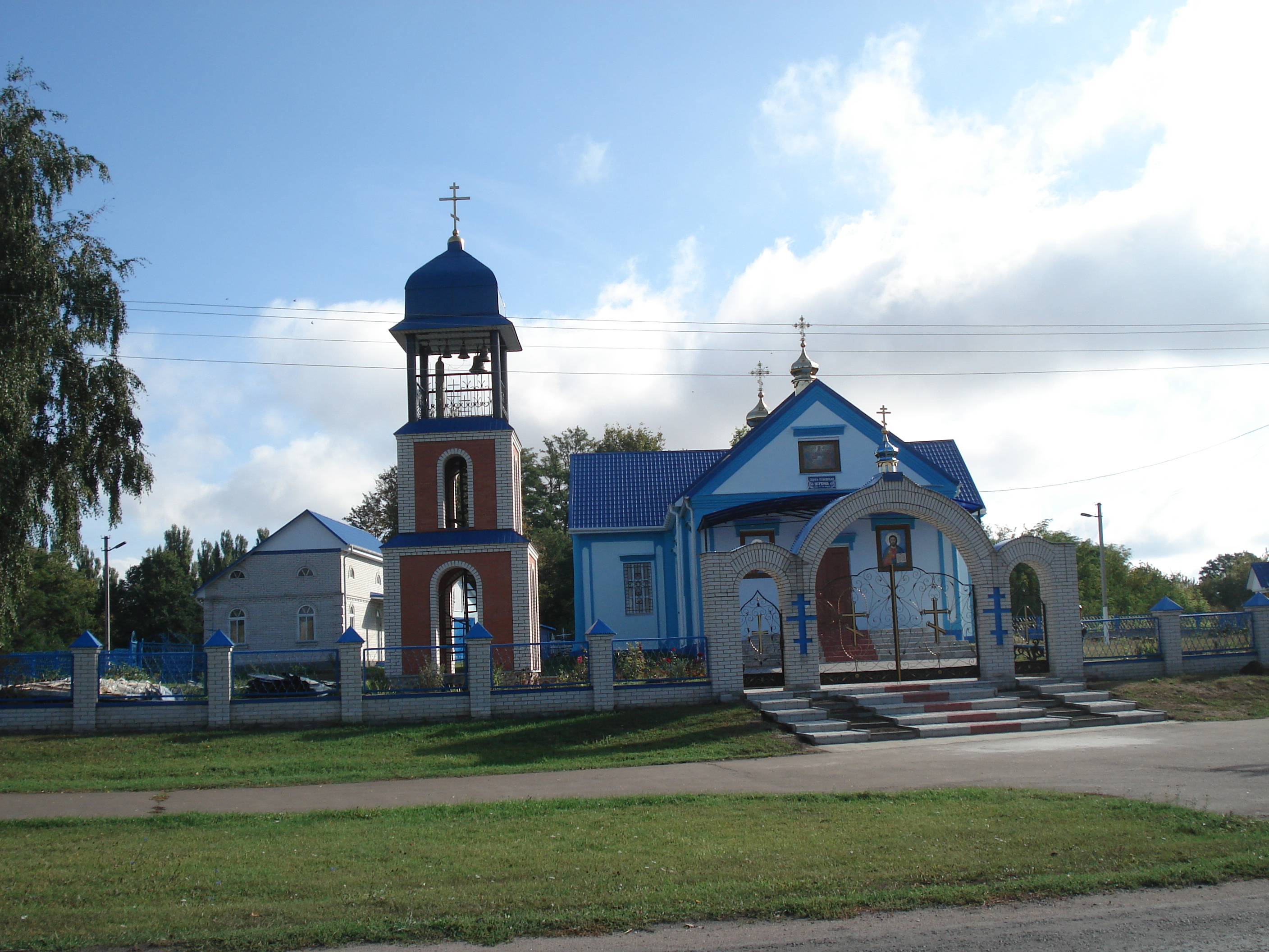 Церква у селі Стара Оржиця Згурівського району Київської області